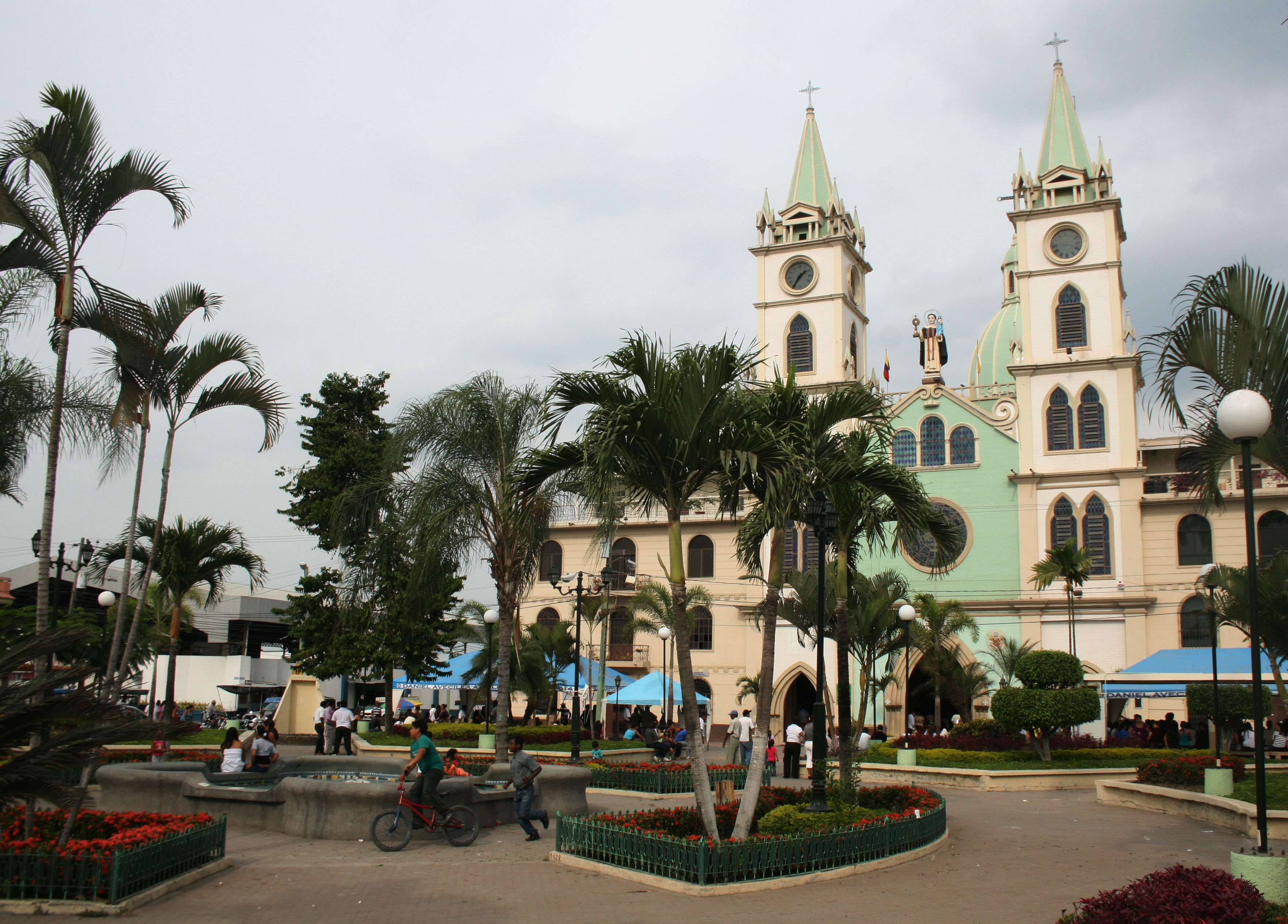 Iglesia (Basílica Menor) de San Jacinto de Yaguachi. Foto por: María Fernanda Landin.